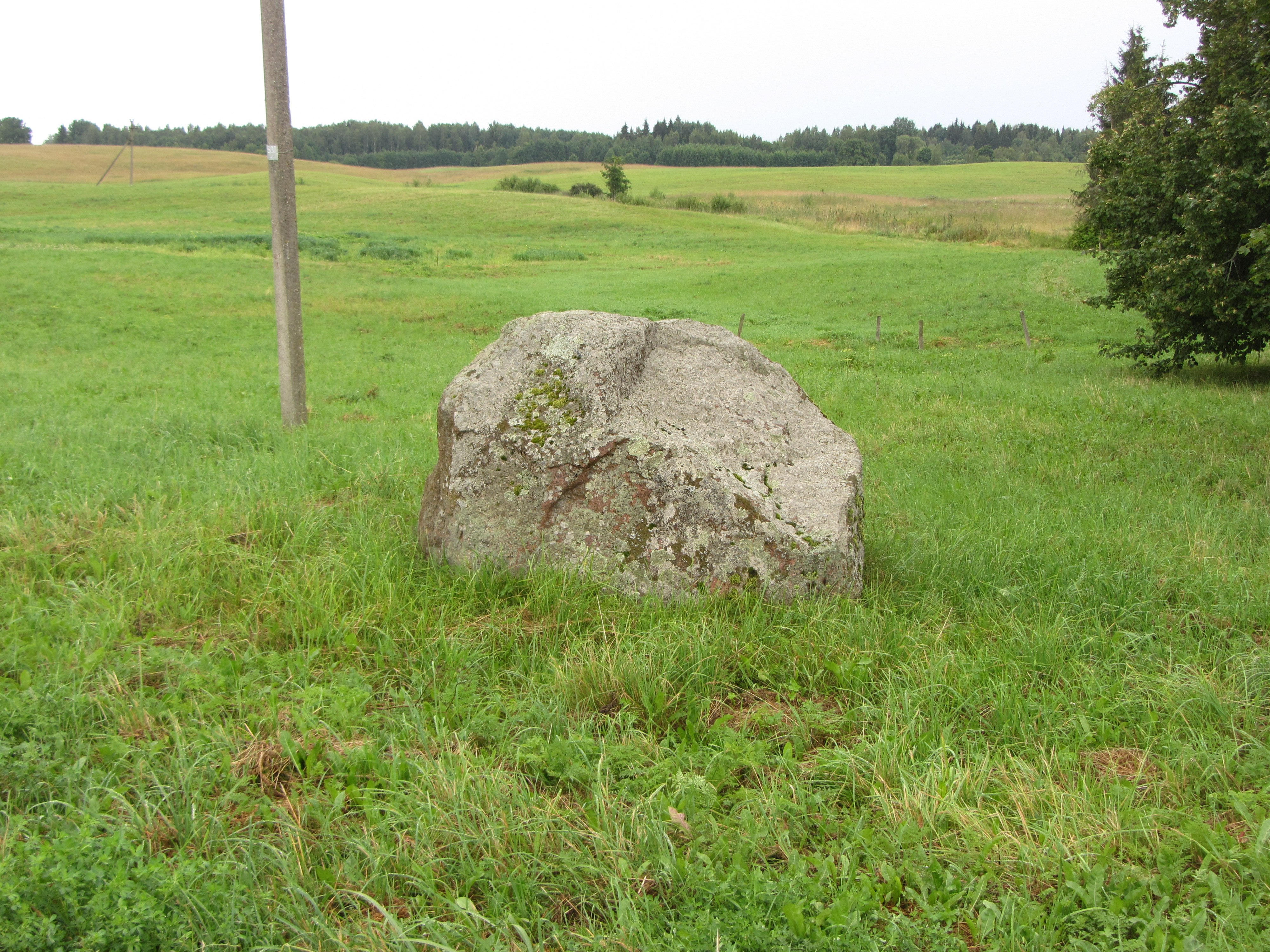 Duliai 32230, Lithuania